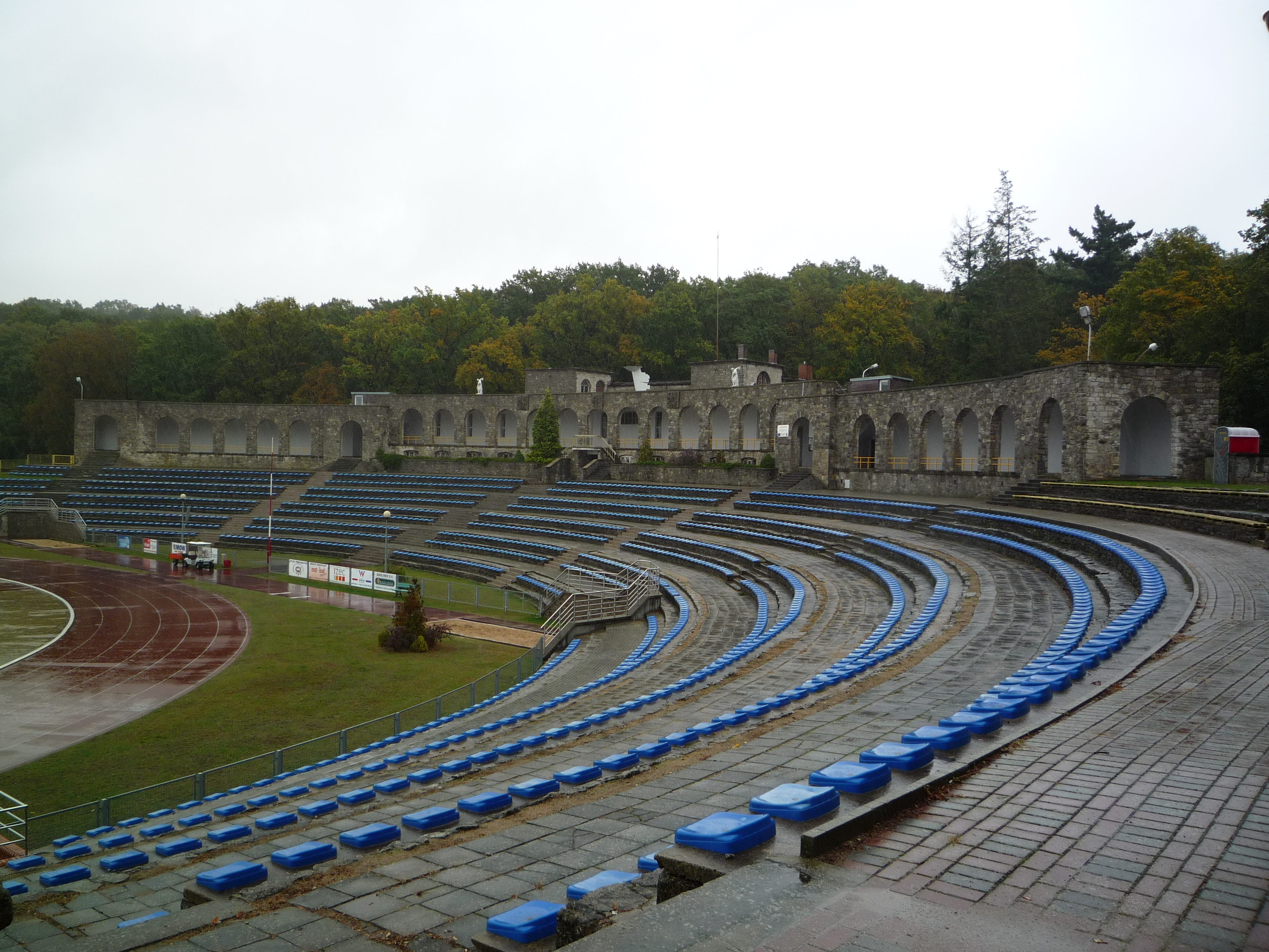 Arkady (trybuna południowa) na stadionie SOSiR w Słubicach.